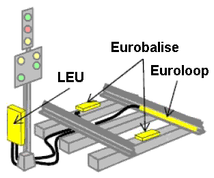 Eurobalise und Euroloop zur Übertragung von Euro-Signum und Euro-ZUB